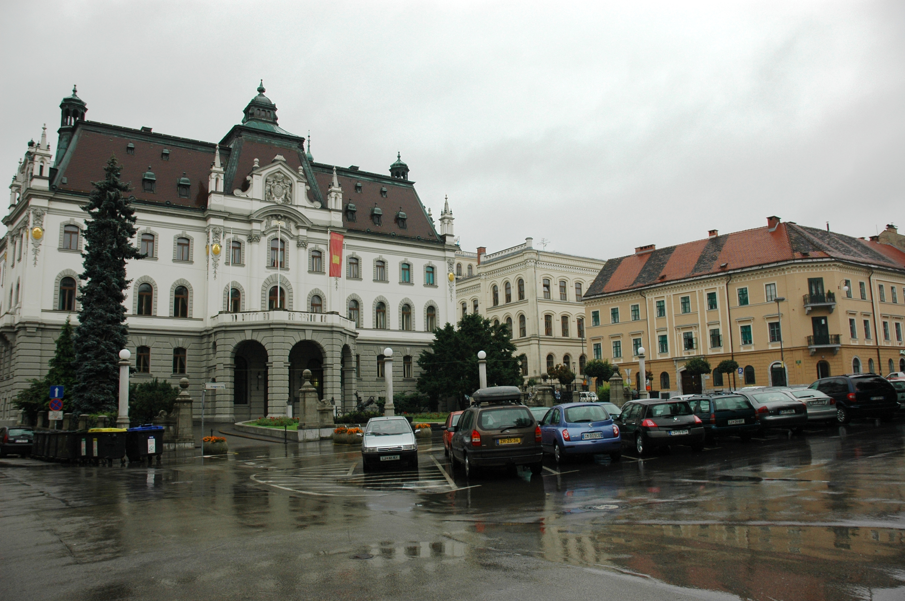 Universitat de Ljubljana